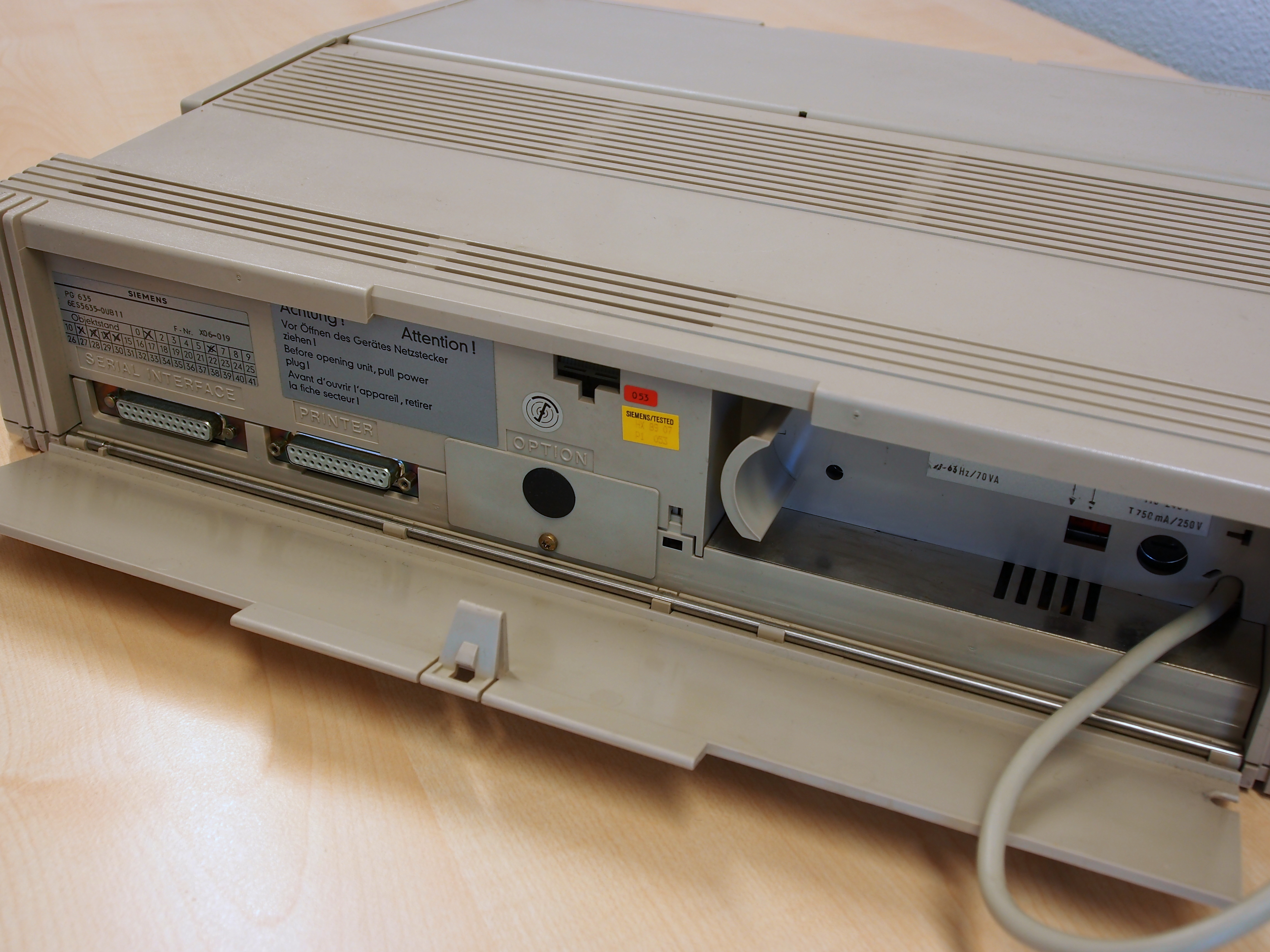 Siemens Simatic S5 PG 635 programmiergerät für PLC.